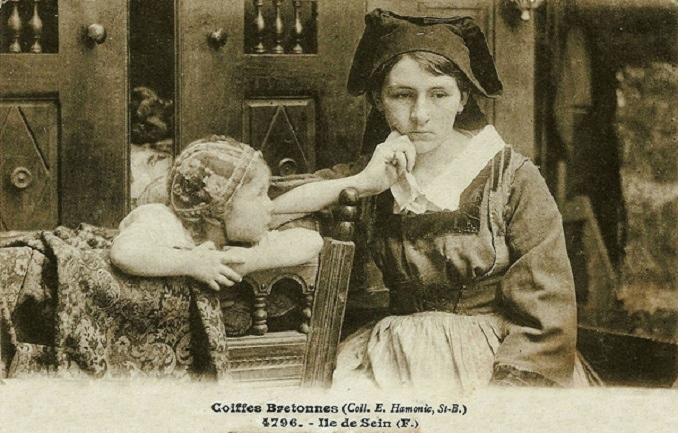 Coiffes de l'Île de Sein (carte postale début XXème siècle, collection Emile Hamonic, Saint-Brieuc)